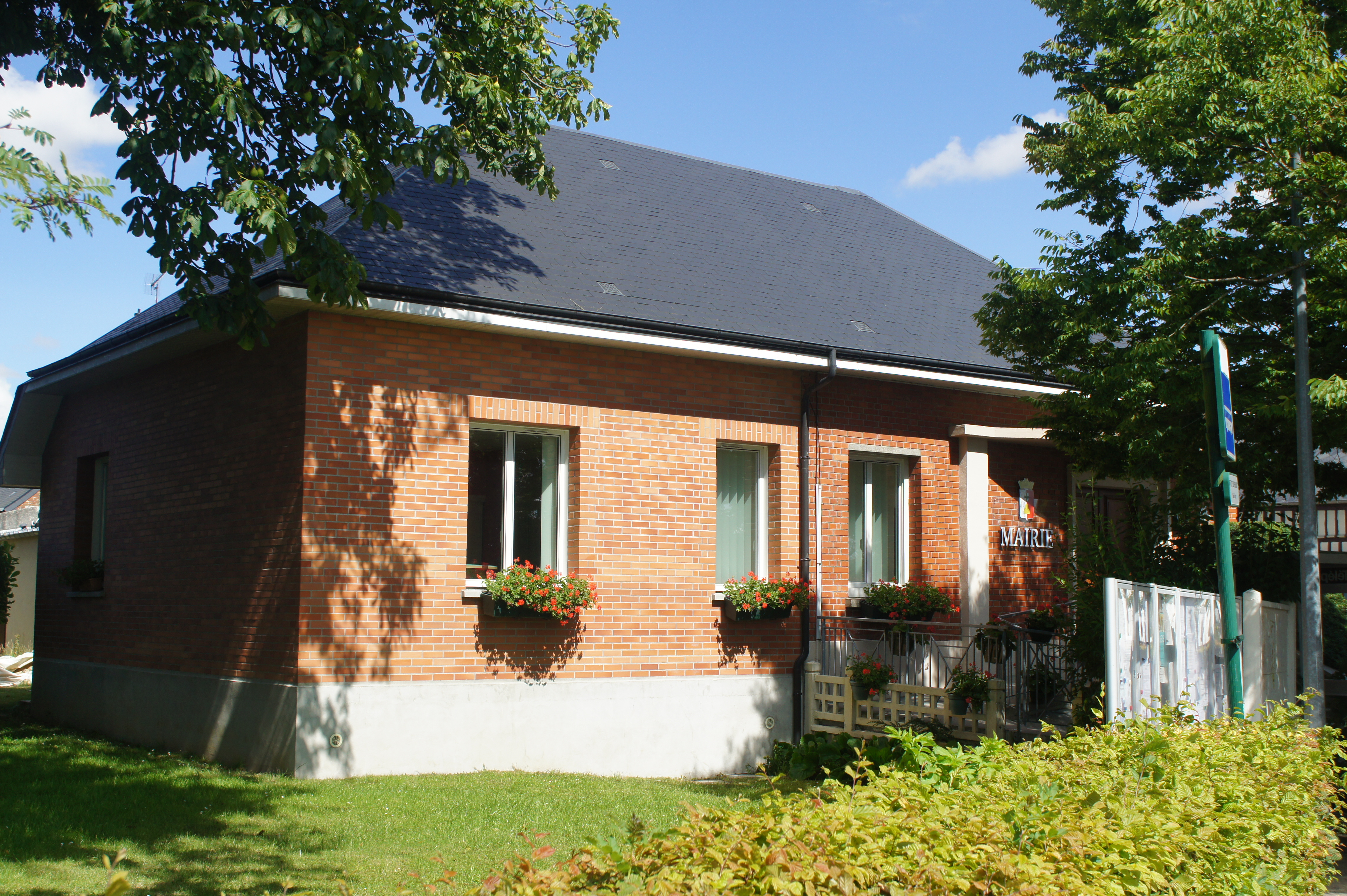 Mairie de Vattetot-sous-Beaumont